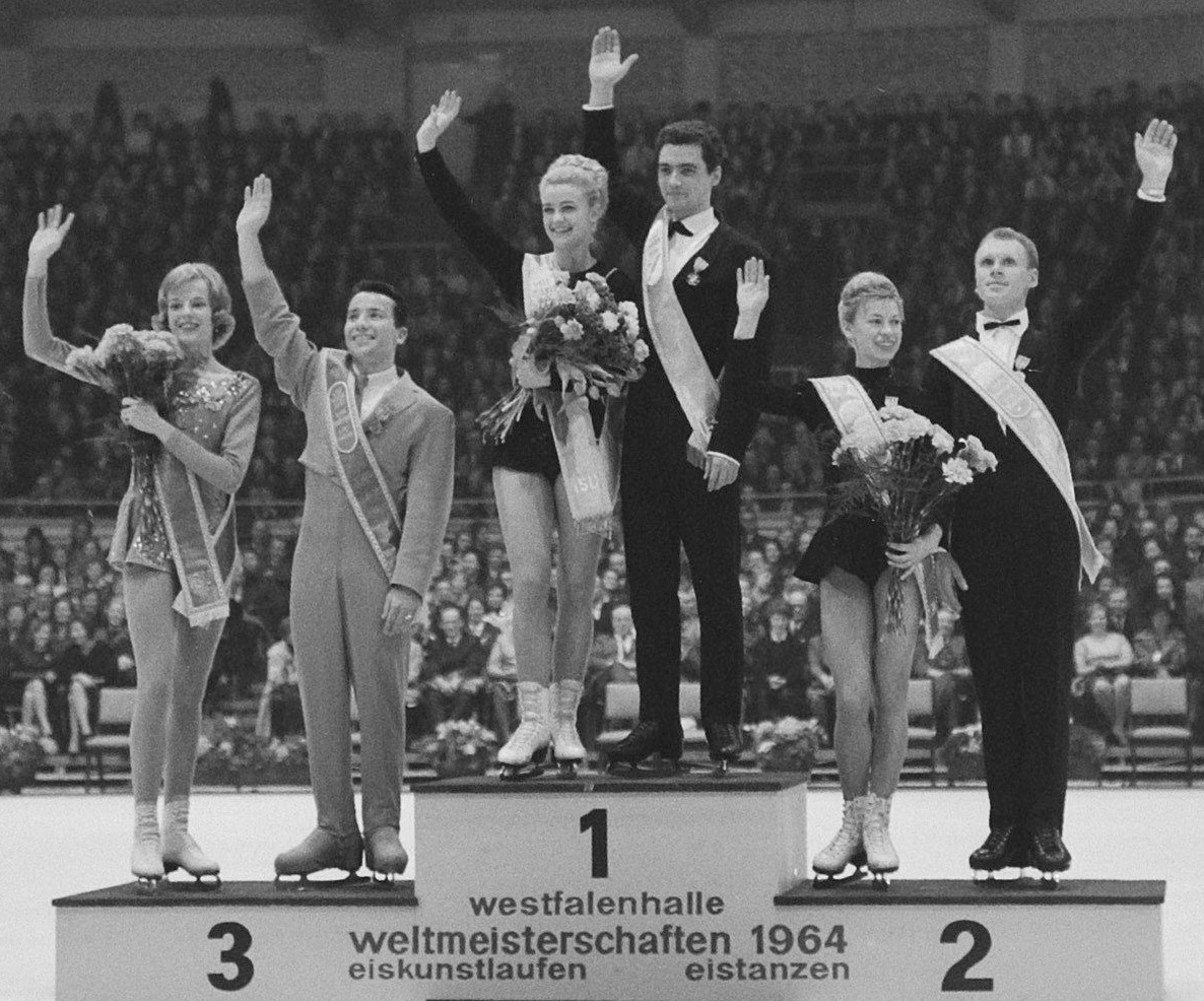 Wereldkampioenschappen kunstrijden te Dortmund, Kilius-Baumler en Wilkes-Ravell.